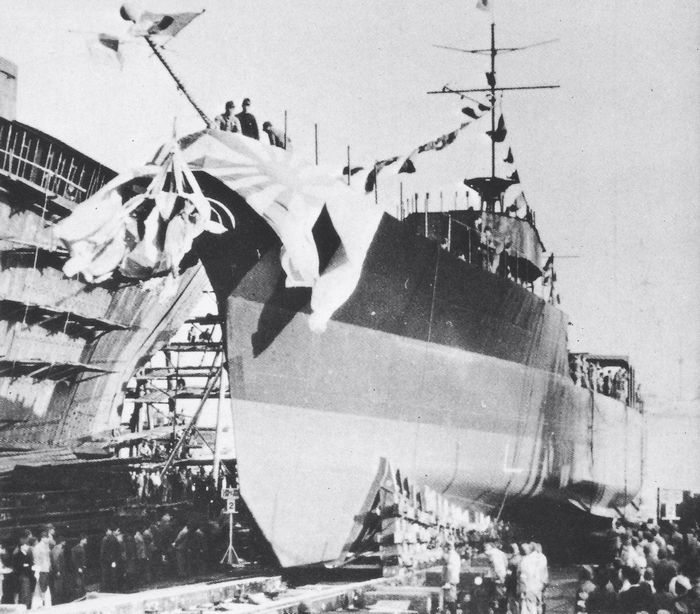 日本海軍 鵜来型海防艦「鵜来」、日本鋼管鶴見造船所